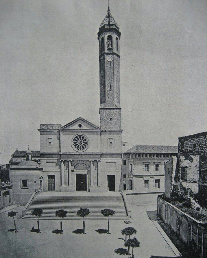 Santa María de Sants (1828), de Francesc Renart.